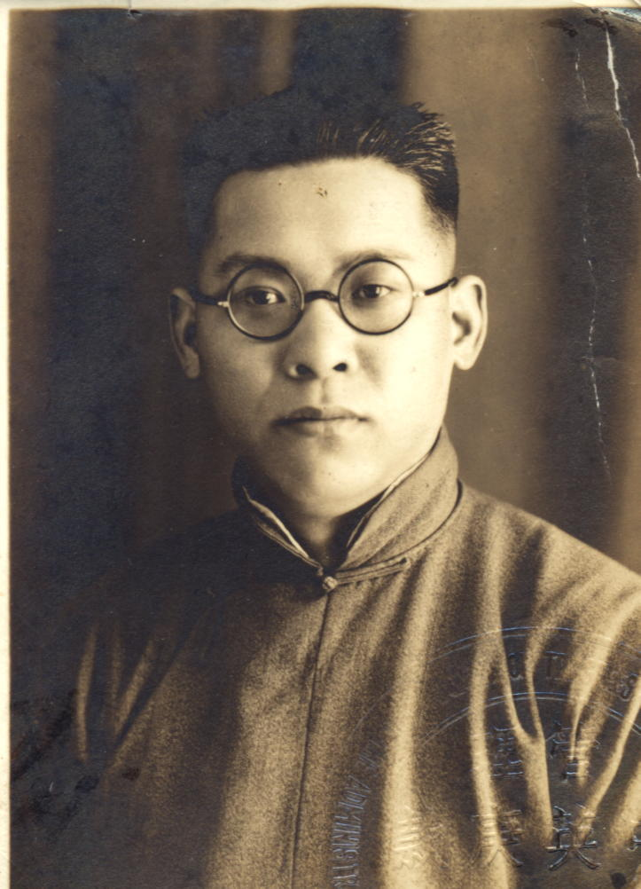 李浩培